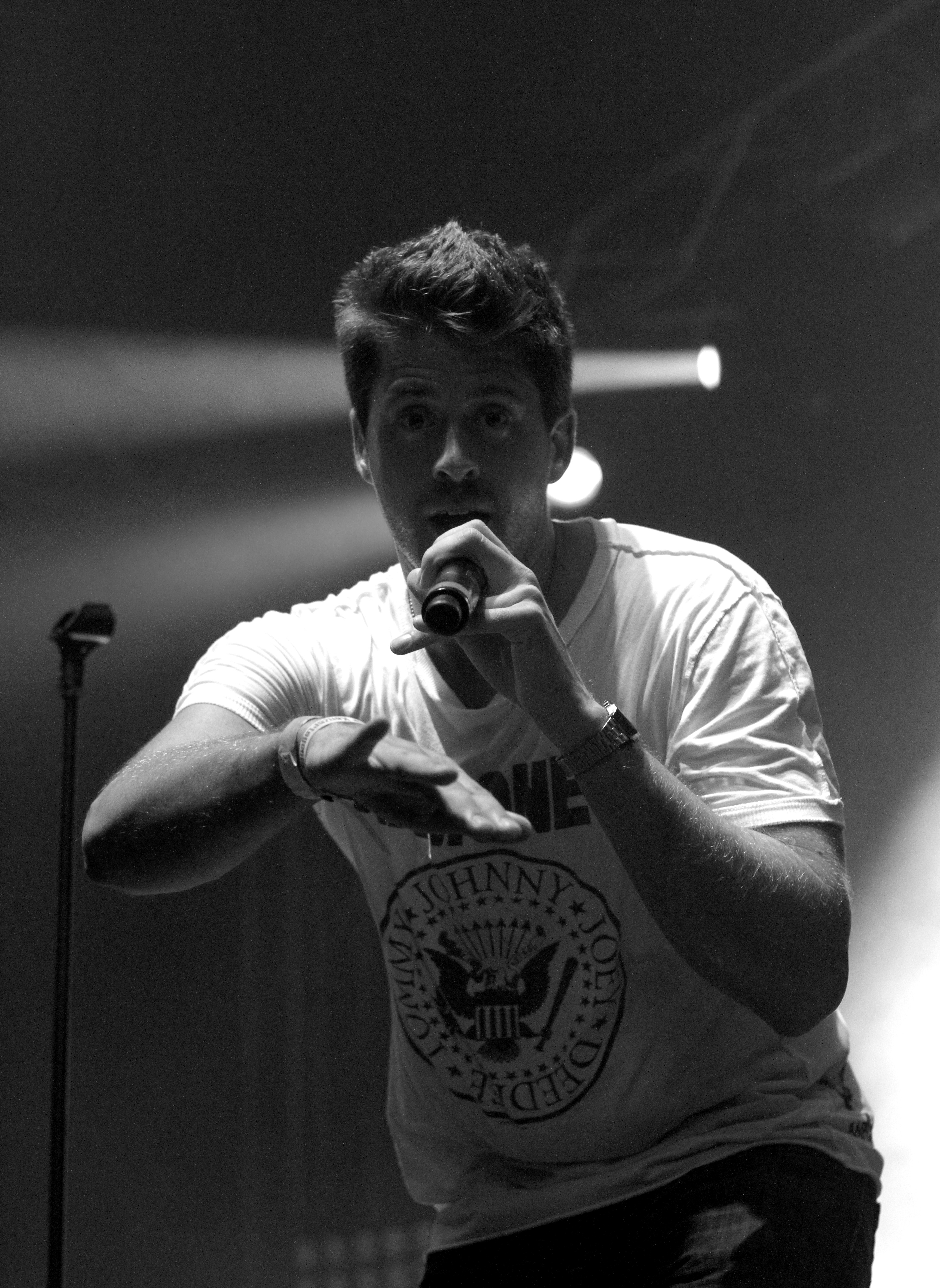 Stonedeafproduction auf dem Chiemsee Reggae Summer Festival 2013 Festivalsommer This photo was created with the support of donations to Wikimedia Österreich and Wikimedia Deutschland in the context of the CPB project "Festival Summer".